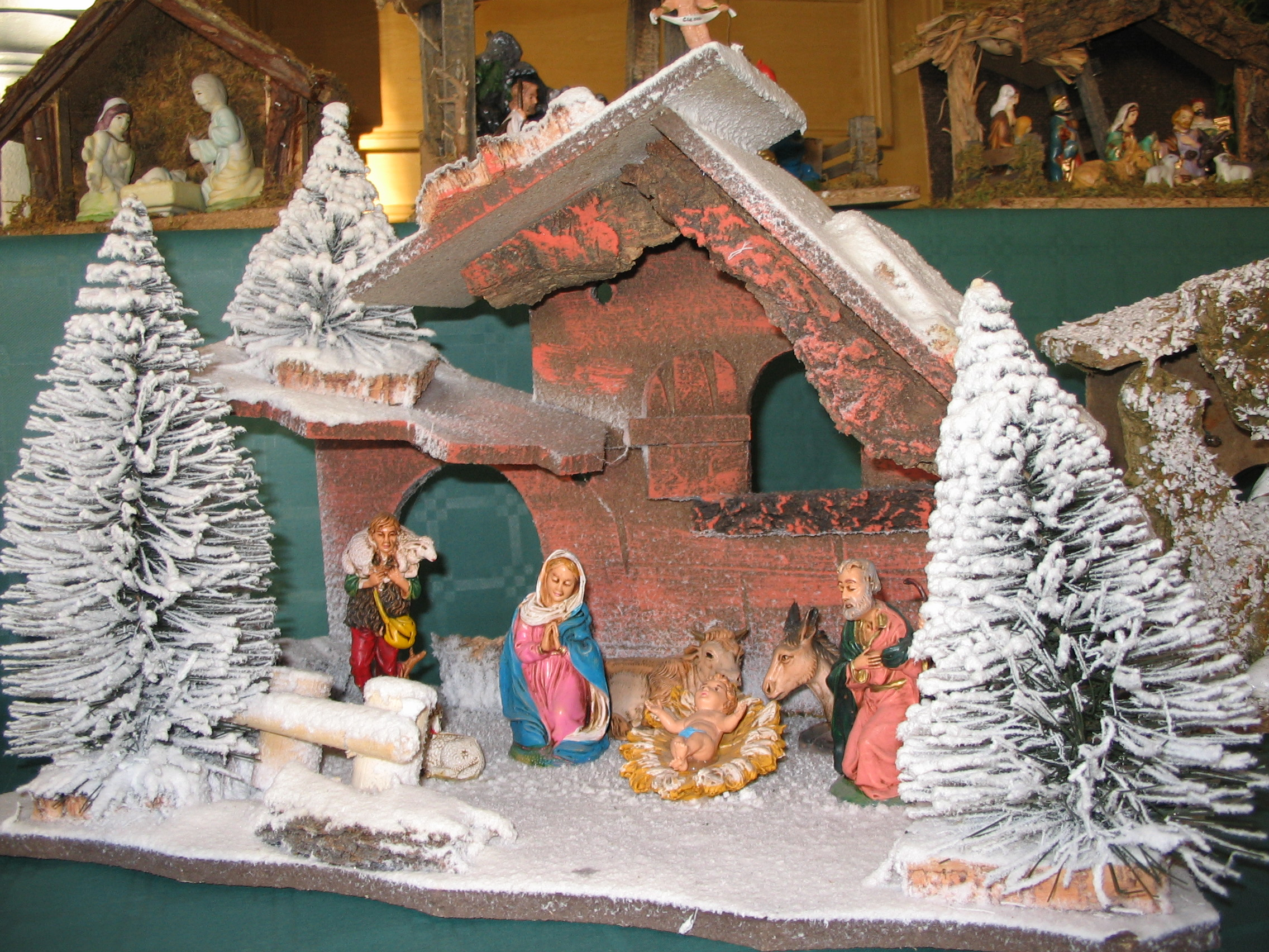 Exposition de crèches miniatures, hiver 2004-05.